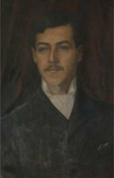 Portrait de l'écrivain Afonso Lopes Vieira, années 1910-1920 (première moitié du XXe siècle). Présenté sur le site public de la Chambre Munipale de Leiria et sur une multitude de blogs.